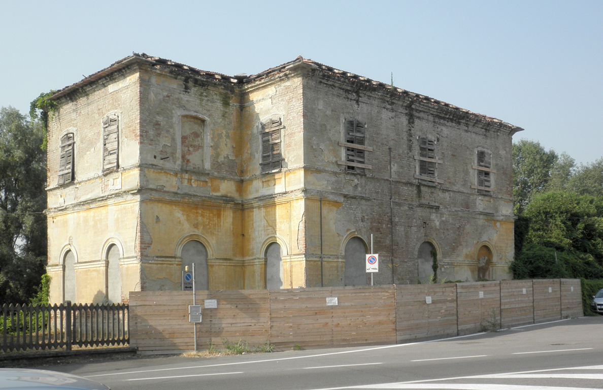 L'ex stazione ferroviaria SNFT di Cremona Porta Milano